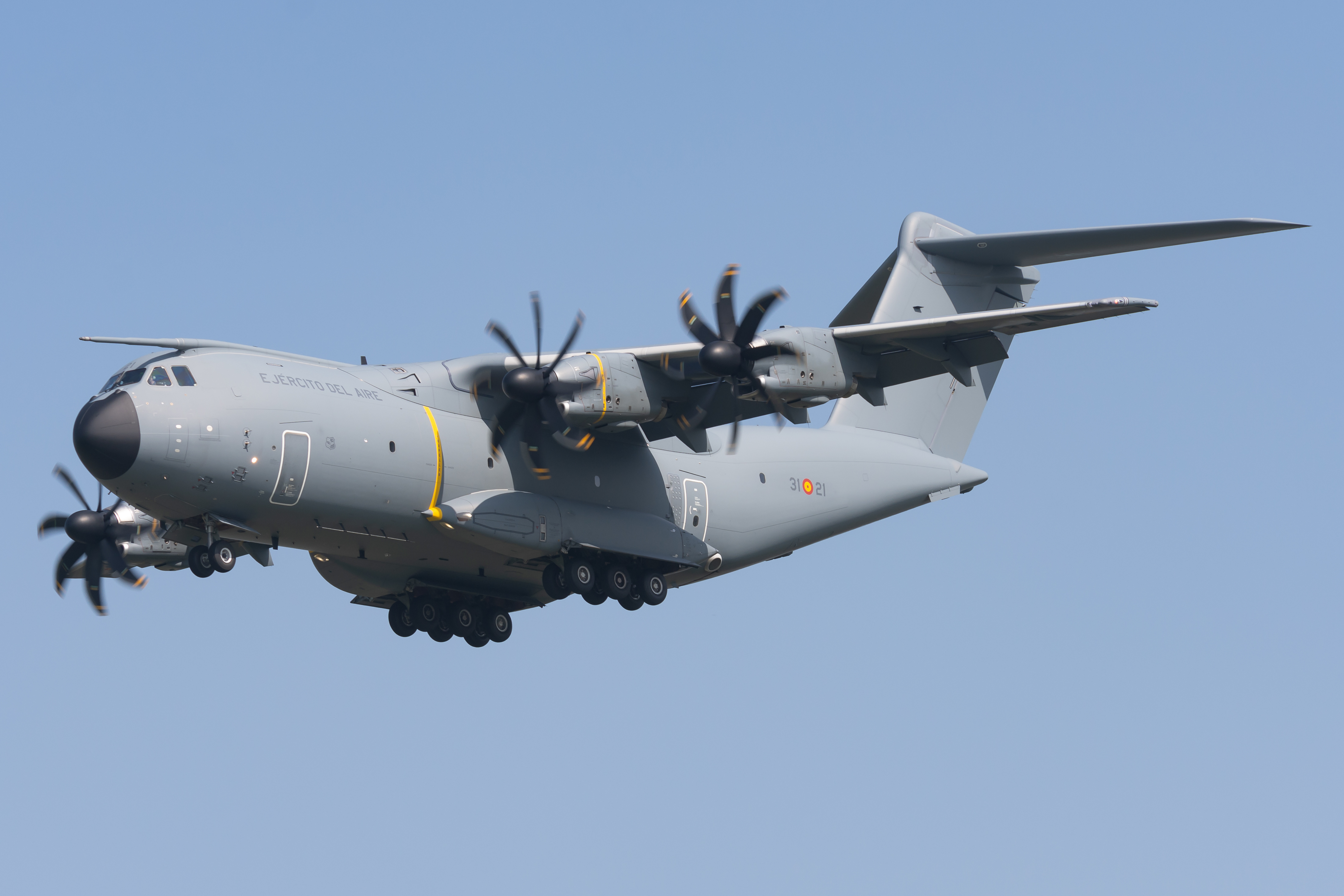 Leeuwarden, April 2018 Frisian Flag